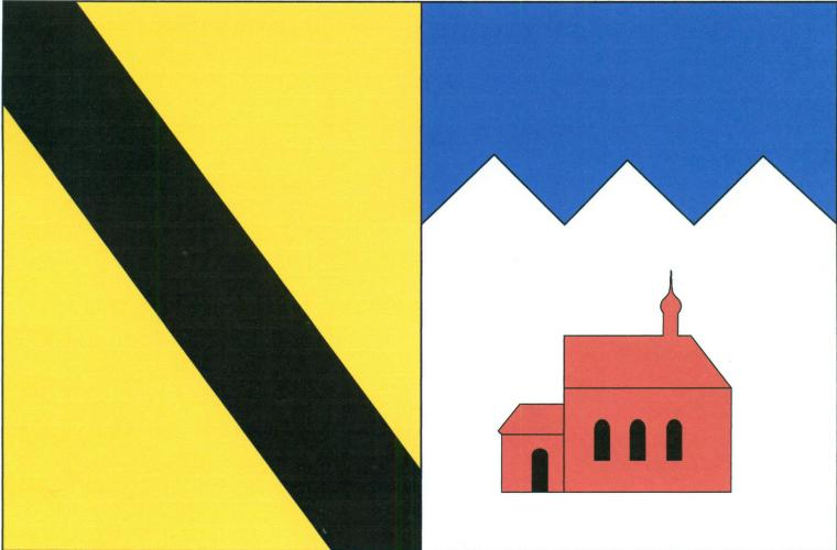 Rušinov vlajka